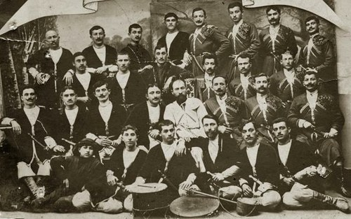 ძუკუ ლოლუას გუნდი